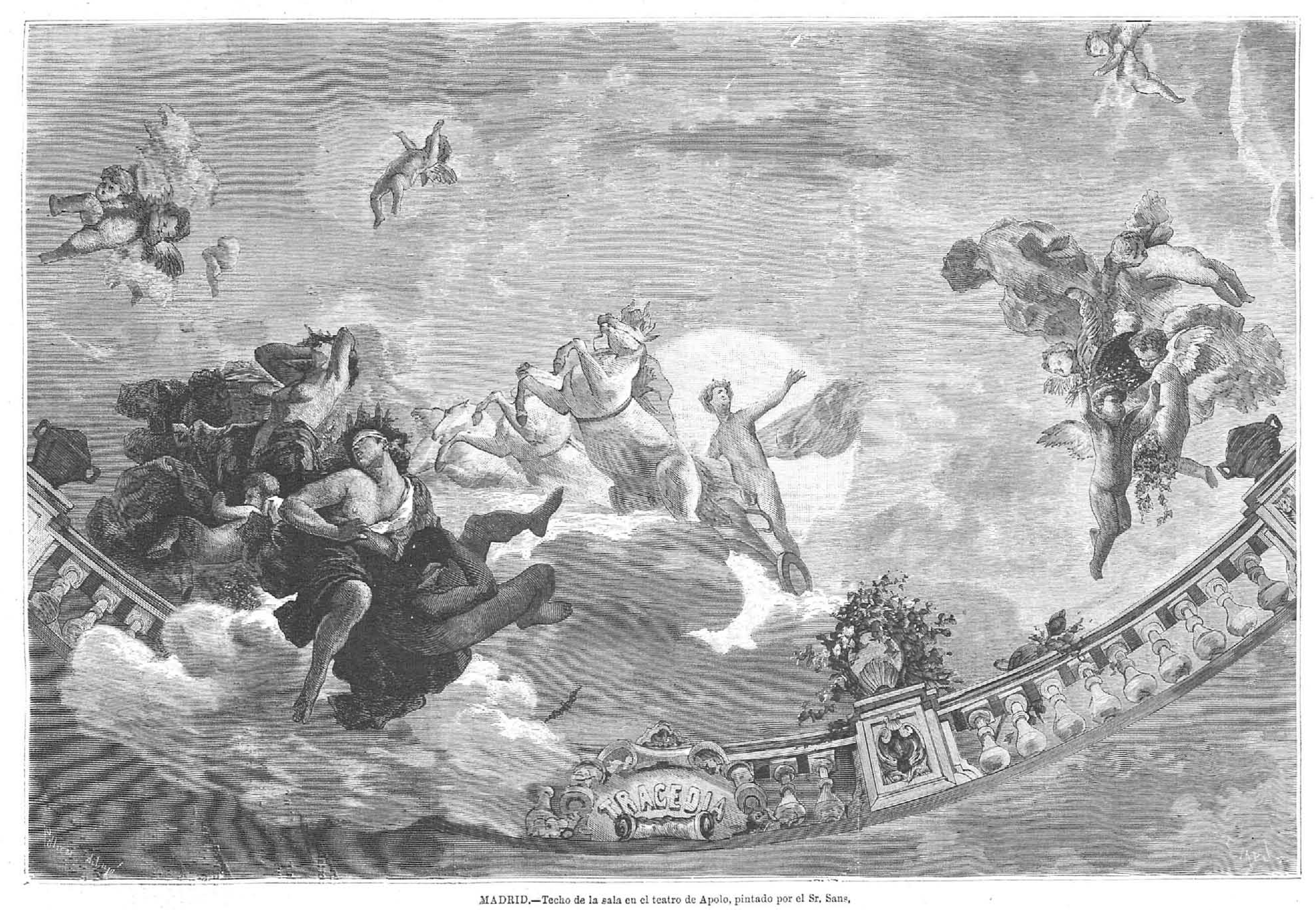 «Techo de la sala en el Teatro de Apolo, pintado por el señor Sans», en la revista española La Ilustración Española y Americana.